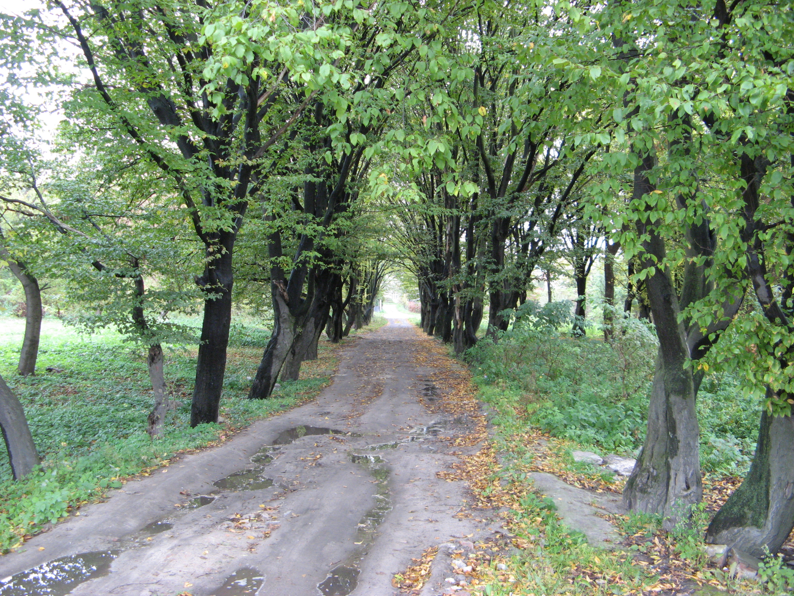 Парк ім. 700-ліття Львова (Львів): Парк ім. 700-ліття Львова (Львів)